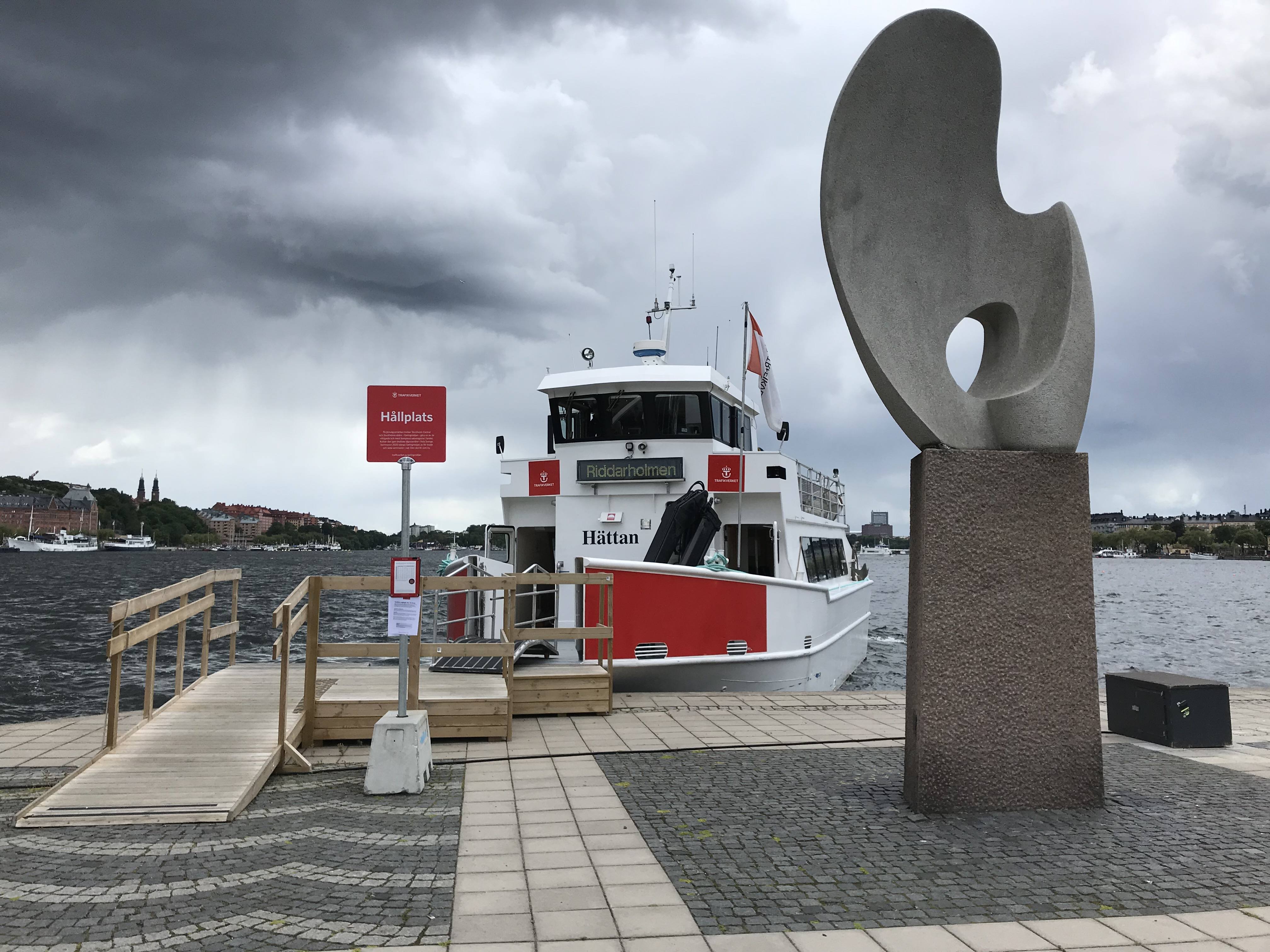 Pendelbåten M/S Hättan ersätter gång- och cykelbanan över Norrström 1 mars 2020 - årsskiftet 2020-2021 och trafikerar sträckan Klara Mälarstrand - Riddarholmen i Trafikverkets regi, under ombyggnationen av järnvägen över Norrström.